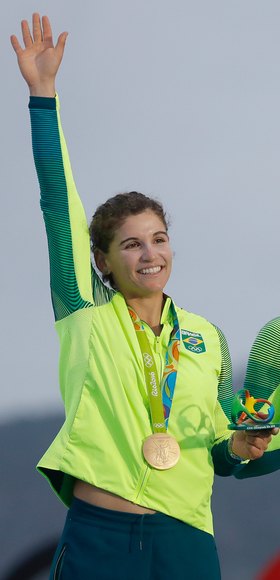 Rio de Janeiro - As brasileiras Martine Grael e Kahena Kunze conquistaram o ouro na classe 49er FX da vela dos Jogos Olímpicos Rio 2016, na regata final na Baía de Guanabara (Fernando Frazão/Agência Brasil)